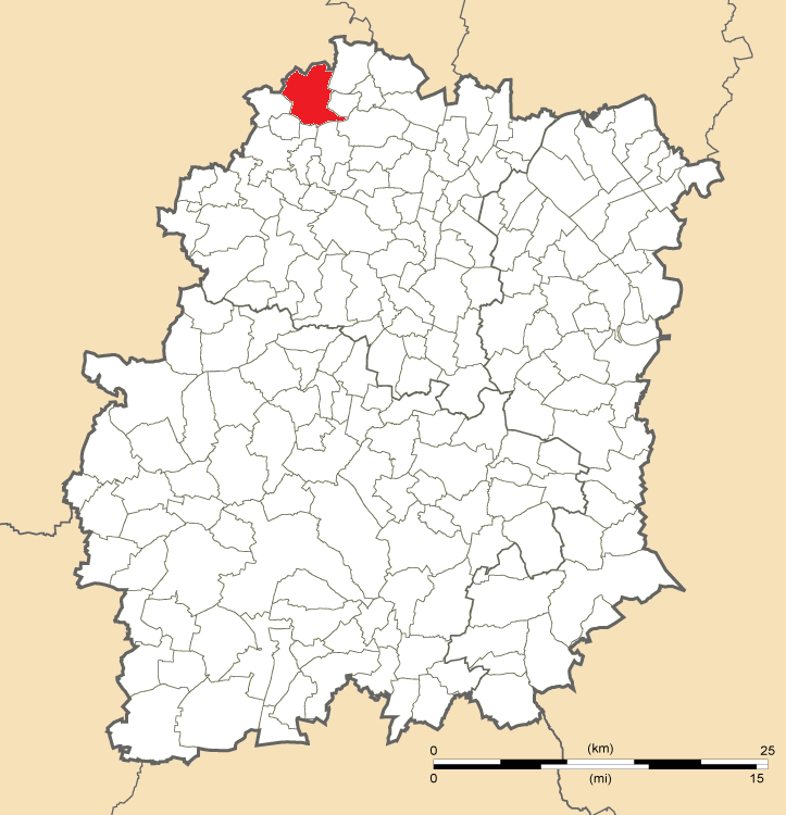 Carte de position de Saclay en Essonne (91)